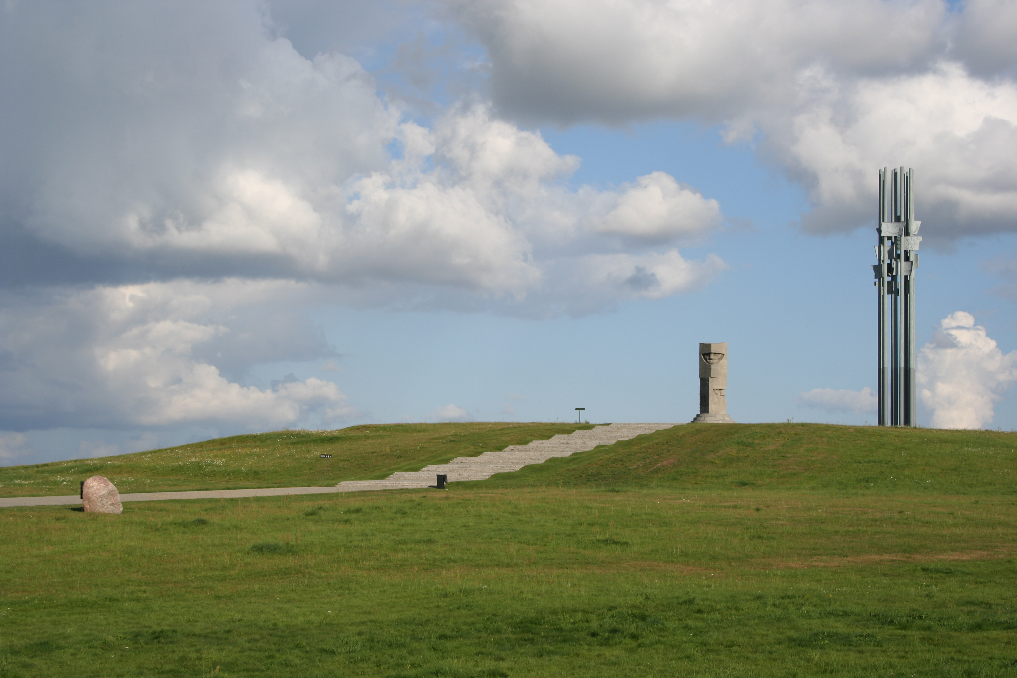 Grunwald, pomnik, 1960 (na polu bitwy z 1410)